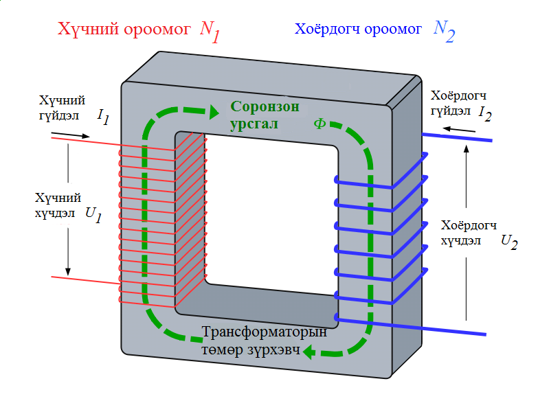 Монгол: Трансформатор